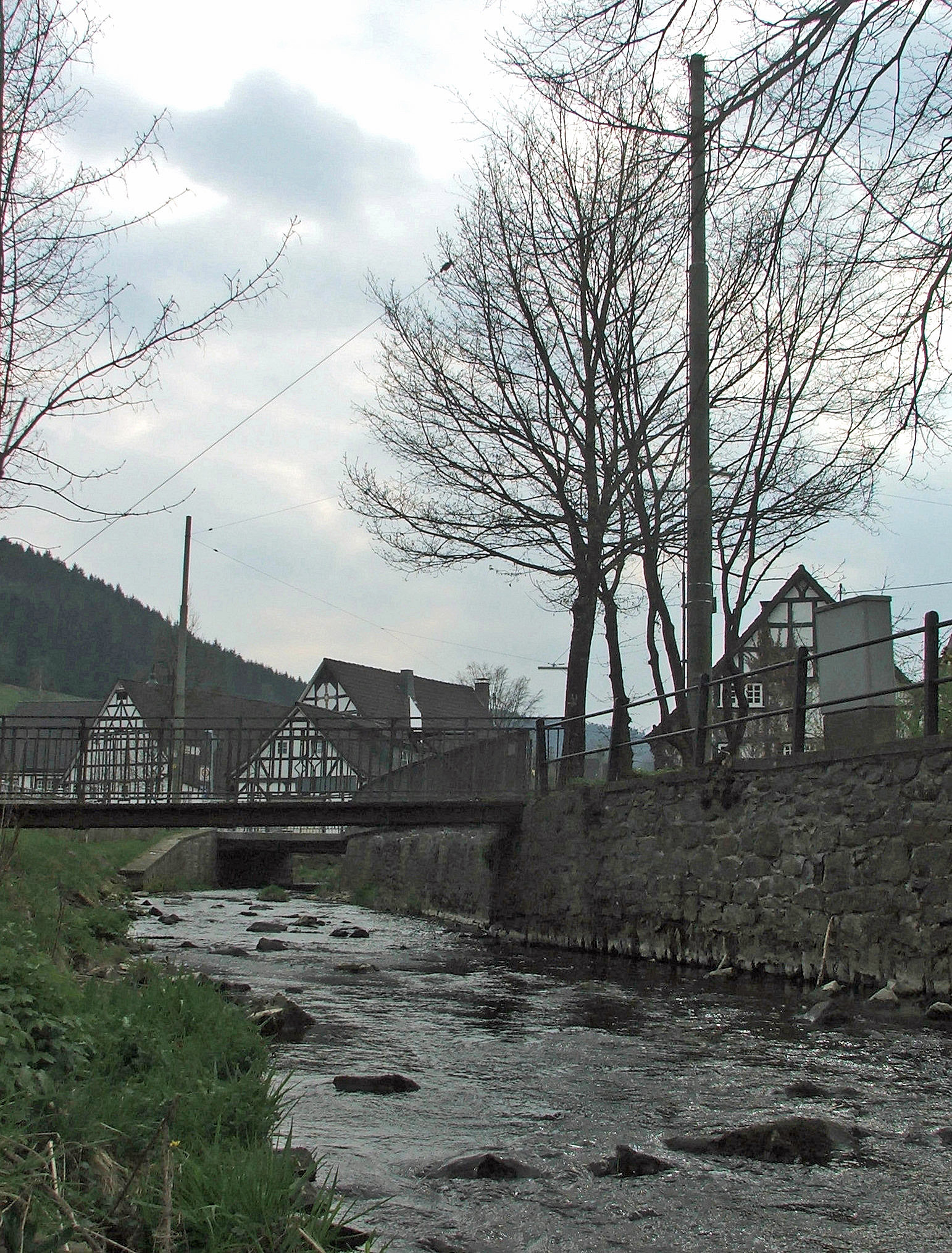 River Veischede at Kirchveischede, Lennestadt